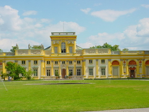 Wilanów, Warszawa (VI.2006)